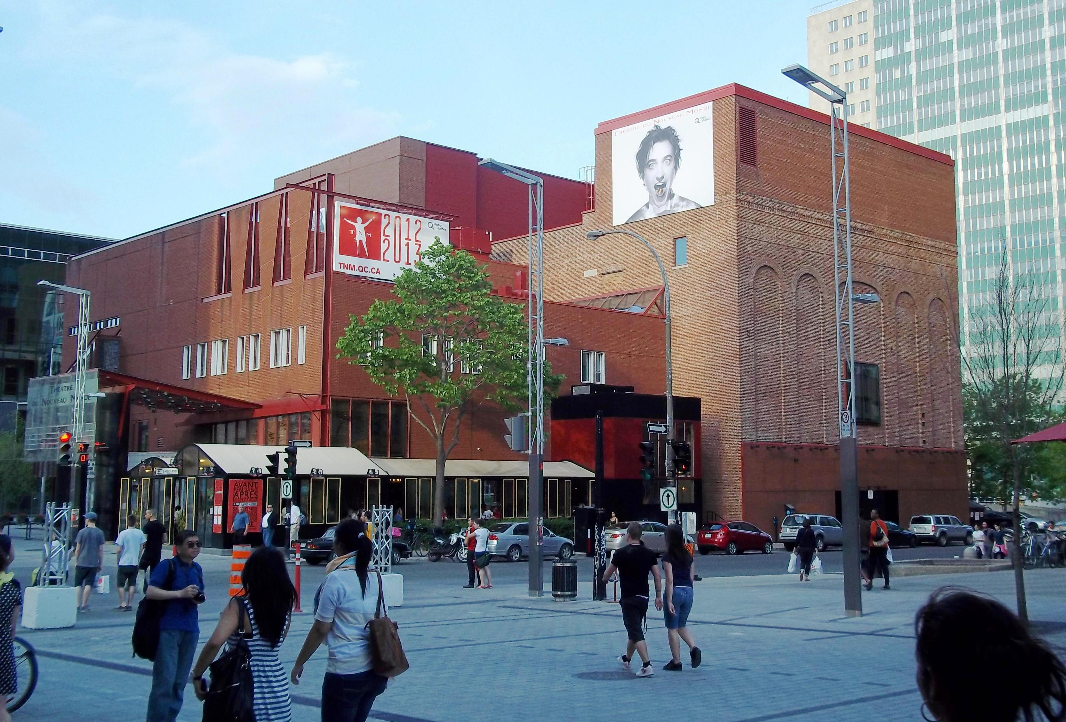 Le Théâtre du Nouveau Monde est situé au 84 rue Sainte-Catherine ouest à Montréal.